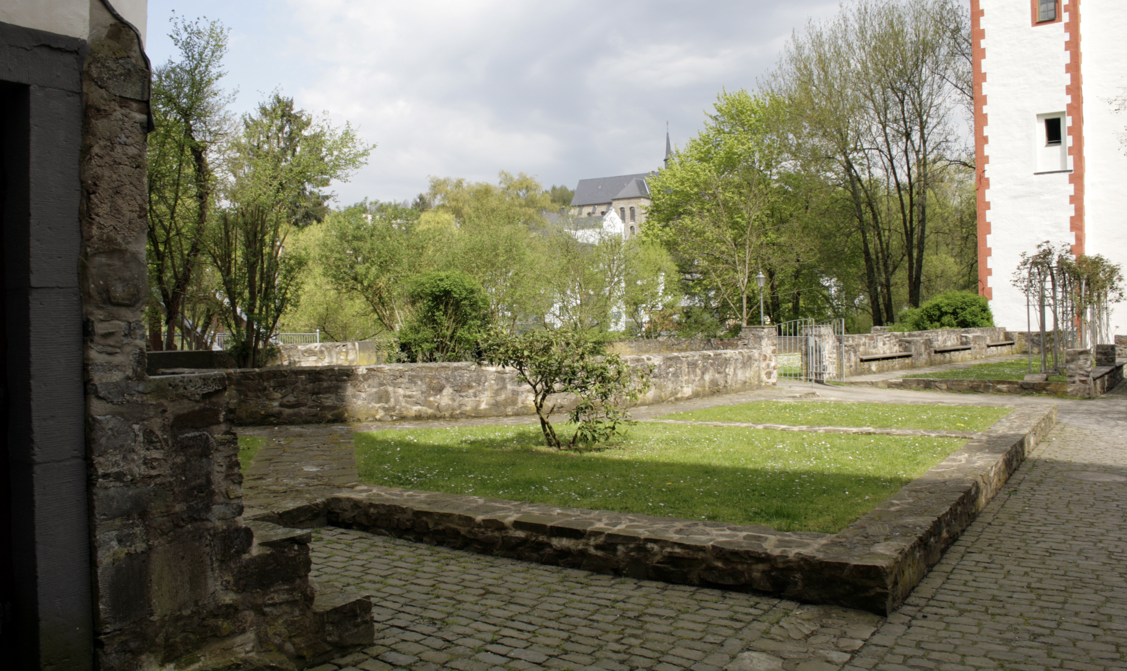 Schloss Hadamar, Reste des Westflügels, Deutschland